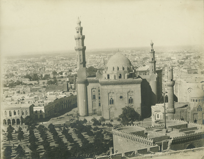 Vue du Caire et mosque Sultan Hussan